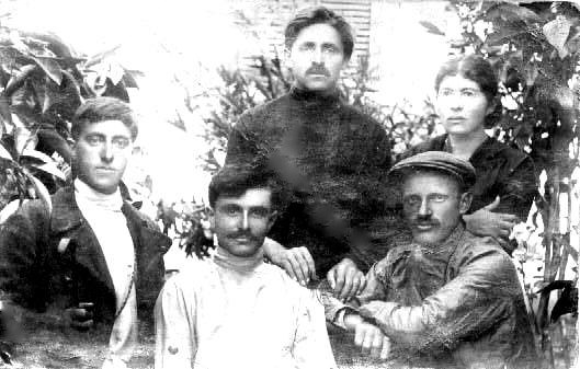 השומר: שורה ראשונה עומדים: בן צבי ינאית רחל, צבי נדב שורה שניה יושבים: שטורמן חיים, צבי וולף ונחום הורוביץ צבי נדב, צבי וולף וחיים שטורמן לובשים חולצה רוסיתThe guard: The first line is standing: Ben Zvi yanait Rachel, Zvi Nadav second row sitting: Shturman Haim, Zvi Wolff and Nahum Horowitz Zvi Nadav, Zvi Wolff and Haim Shturman wearing a Russian shirt {English translation]